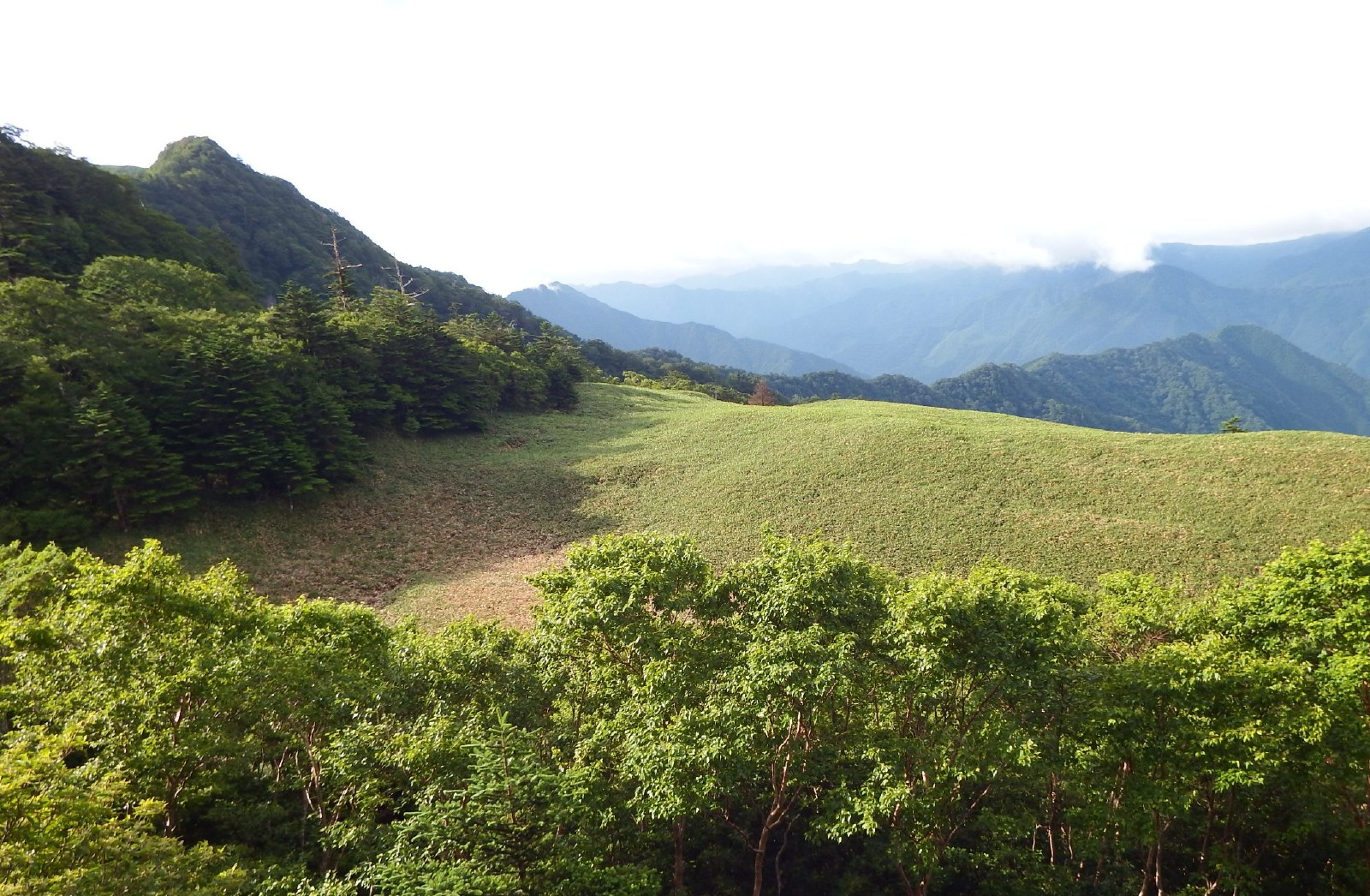 西黒森の神鳴池